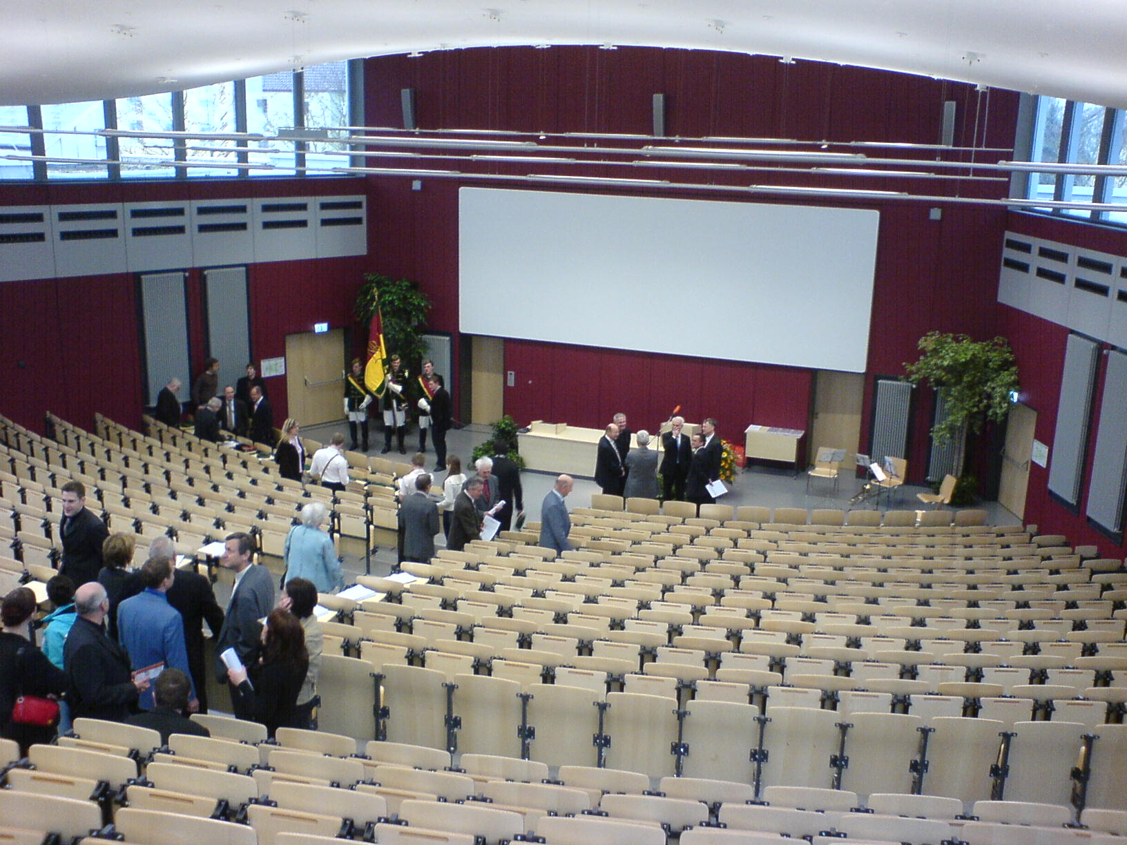 Eröffnungsfeier der sanierten Aula in der FH Schweinfurt. Erkennbar sollte auch der bayerische Wissenschaftsminister Thomas Goppel sein.